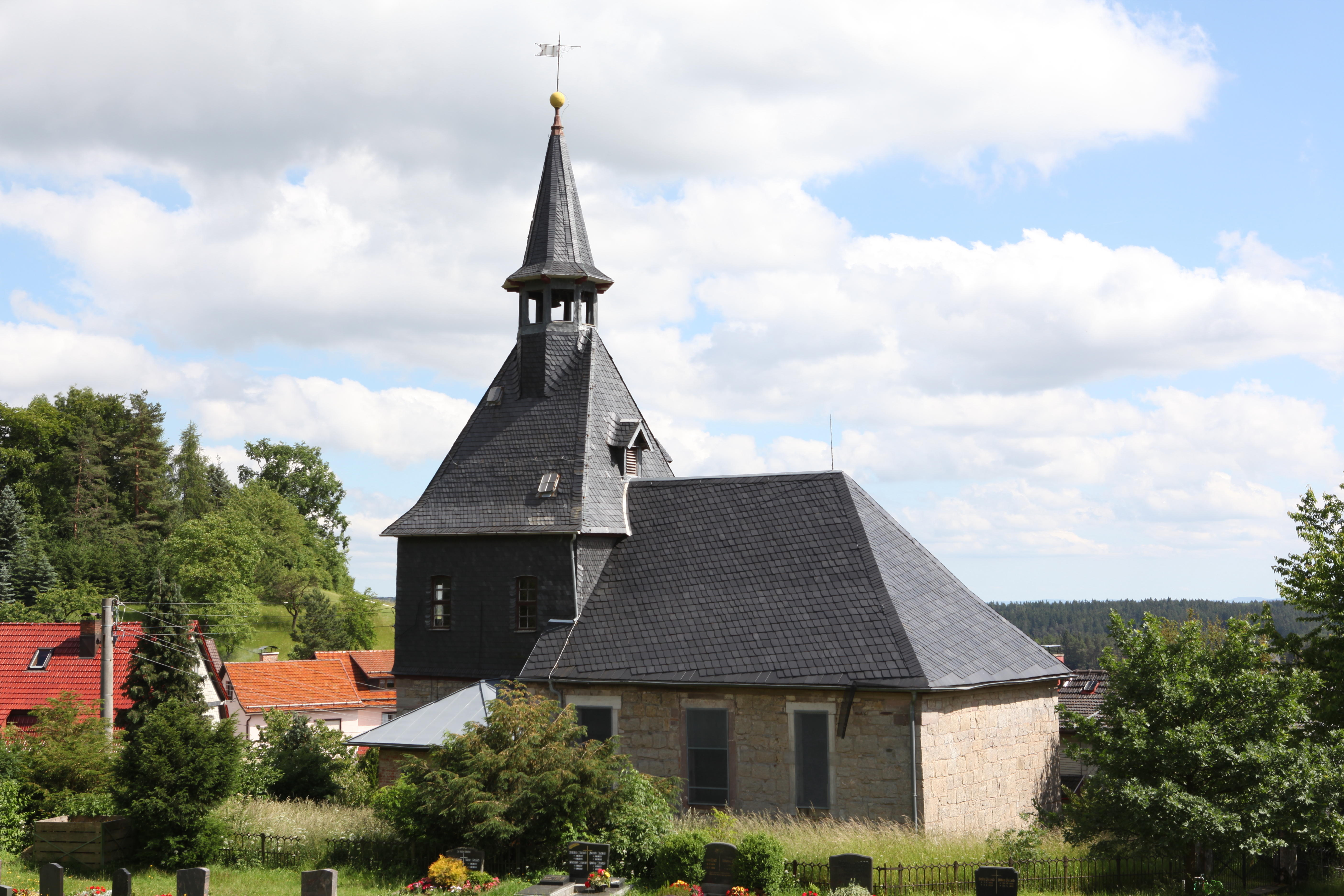 Evangelisch-lutherische Kirche Katharinenkirche in Meschenbach, OT von Frankenblick, Thüringen